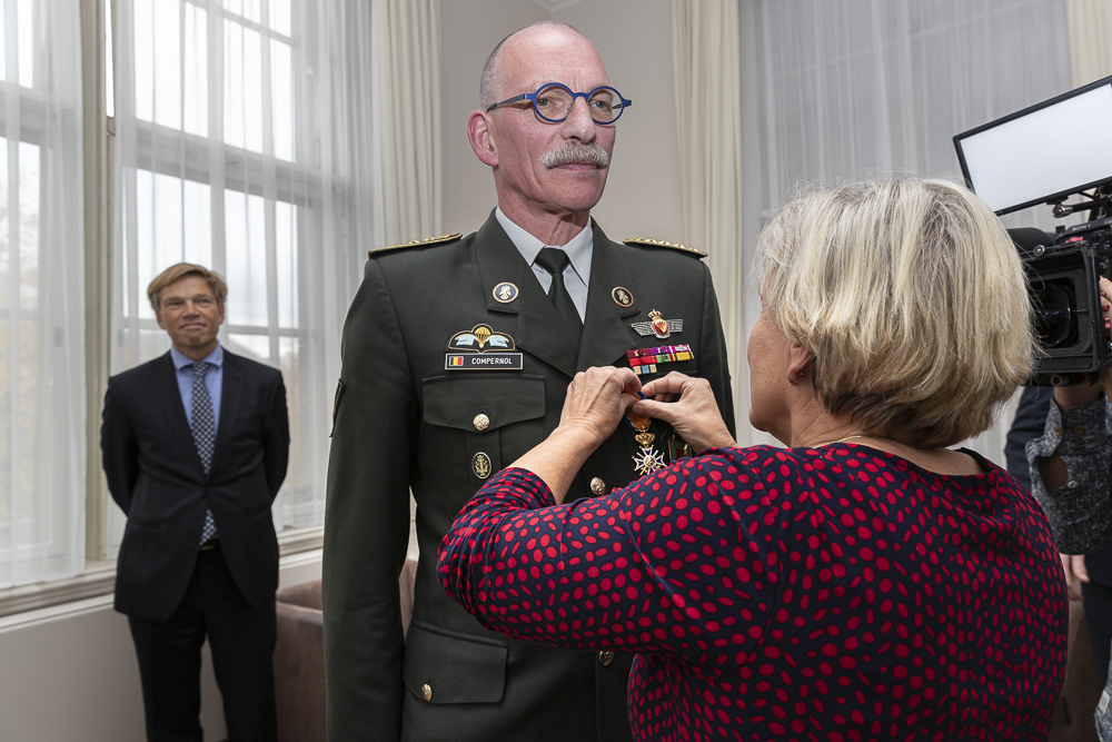 Den Haag, 15 Oktober 2019De Belgische commandant der strijdkrachten generaal Compernol bezoekt samen met nederlandse CDS Rob Bauer de ere-ceremonie op het plein en volbrengt daarna plechtigheden in het stafgebouw